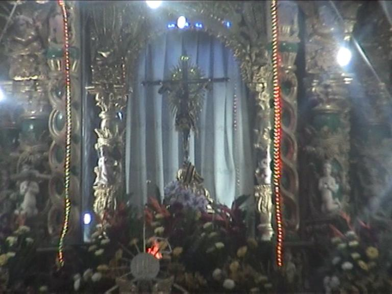 Cristo Señor de los Milagros, Catedral de Punata